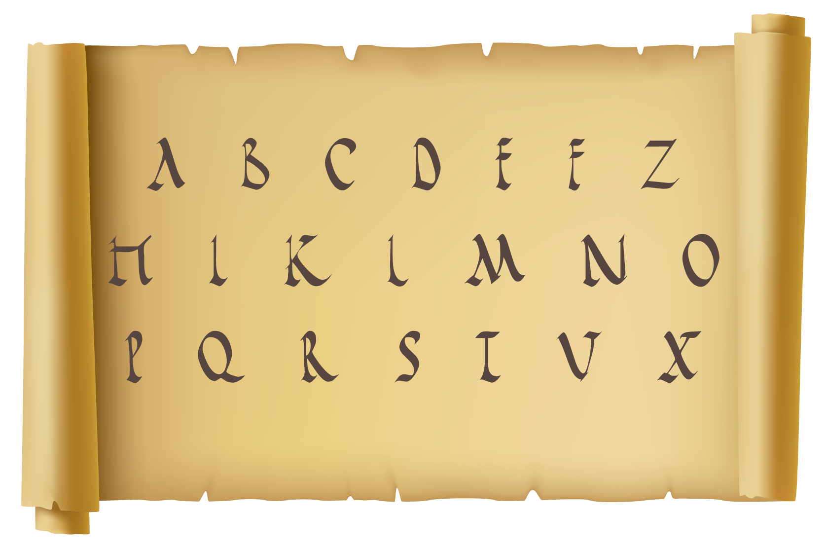 Las 21 letras del abecedario latino original. Tipografía romana rústica.